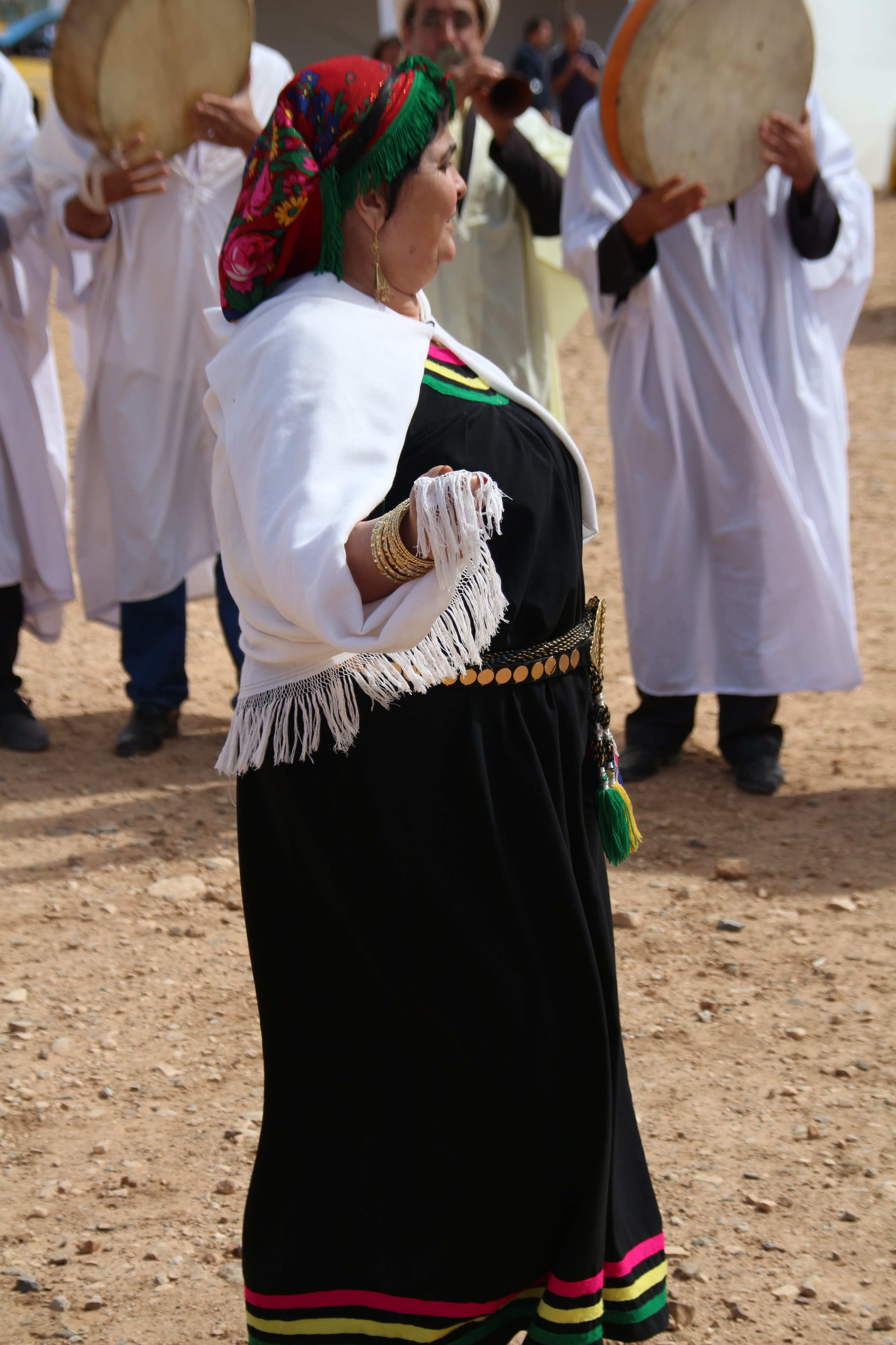 danseuse folklorique Auressienne ce genre de danse est en voie de disparition